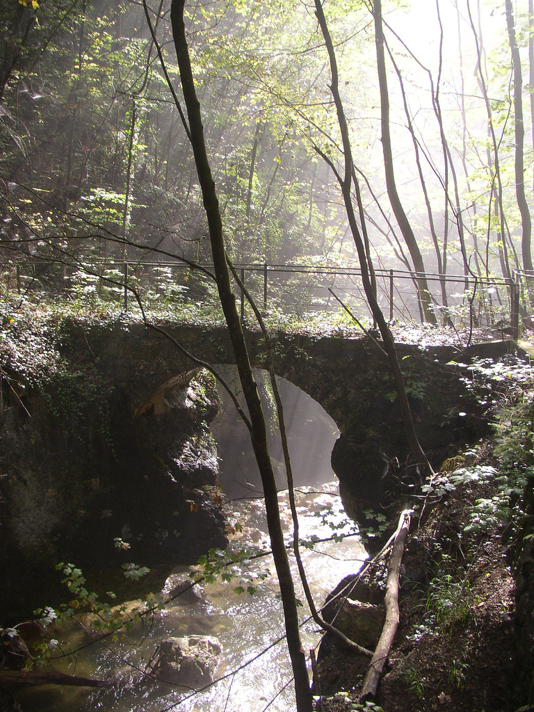 Gorges du Taubenloch, Bienne